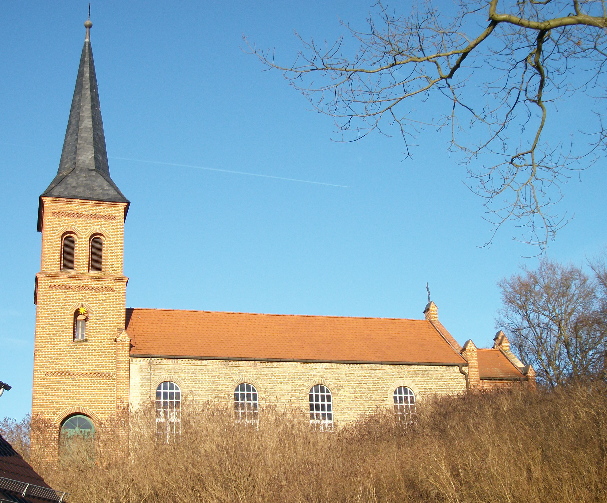 Denkmalgeschützte Dorfkirche in Emstal, Gemeinde Kloster Lehnin. 1875 bis 1891 durch Umbau eines Vorgängerbaus aus Fachwerk errichtet.